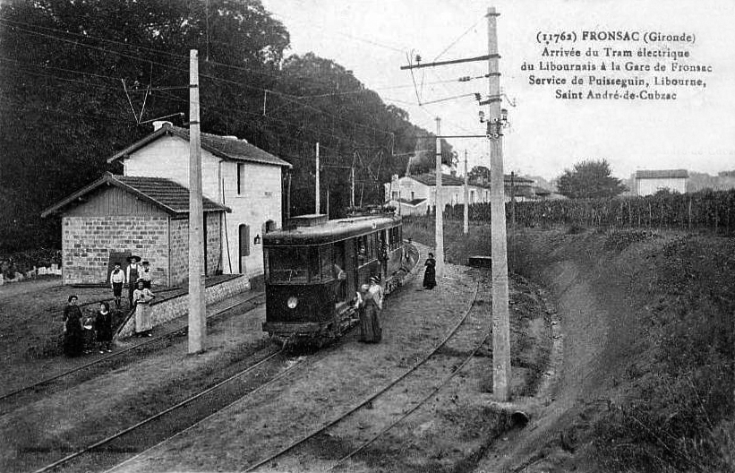 La gare de Fronsac de la ligne Tramway de Saint-André-de-Cubzac à Libourne et à Puisseguin exploitée par les Tramways électriques du Libournais.